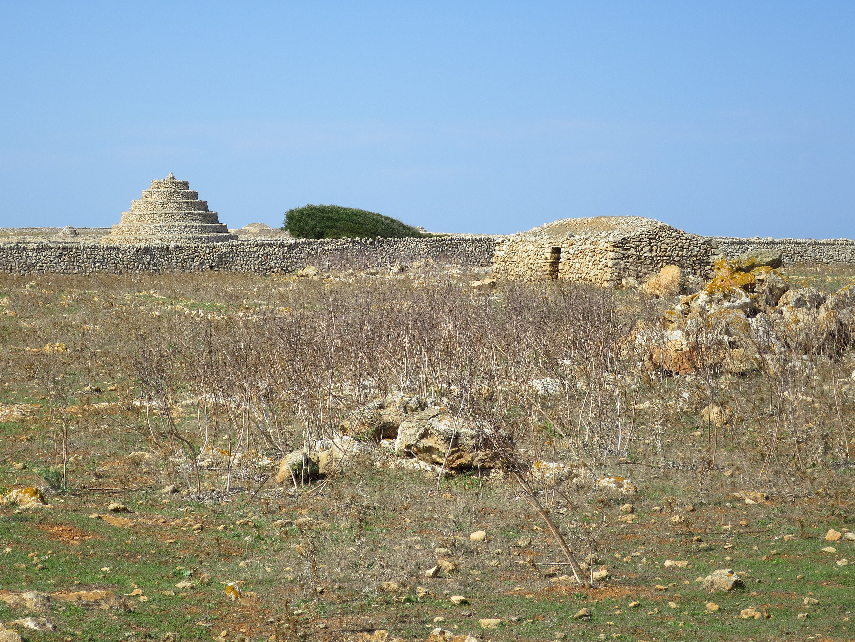 Farmland